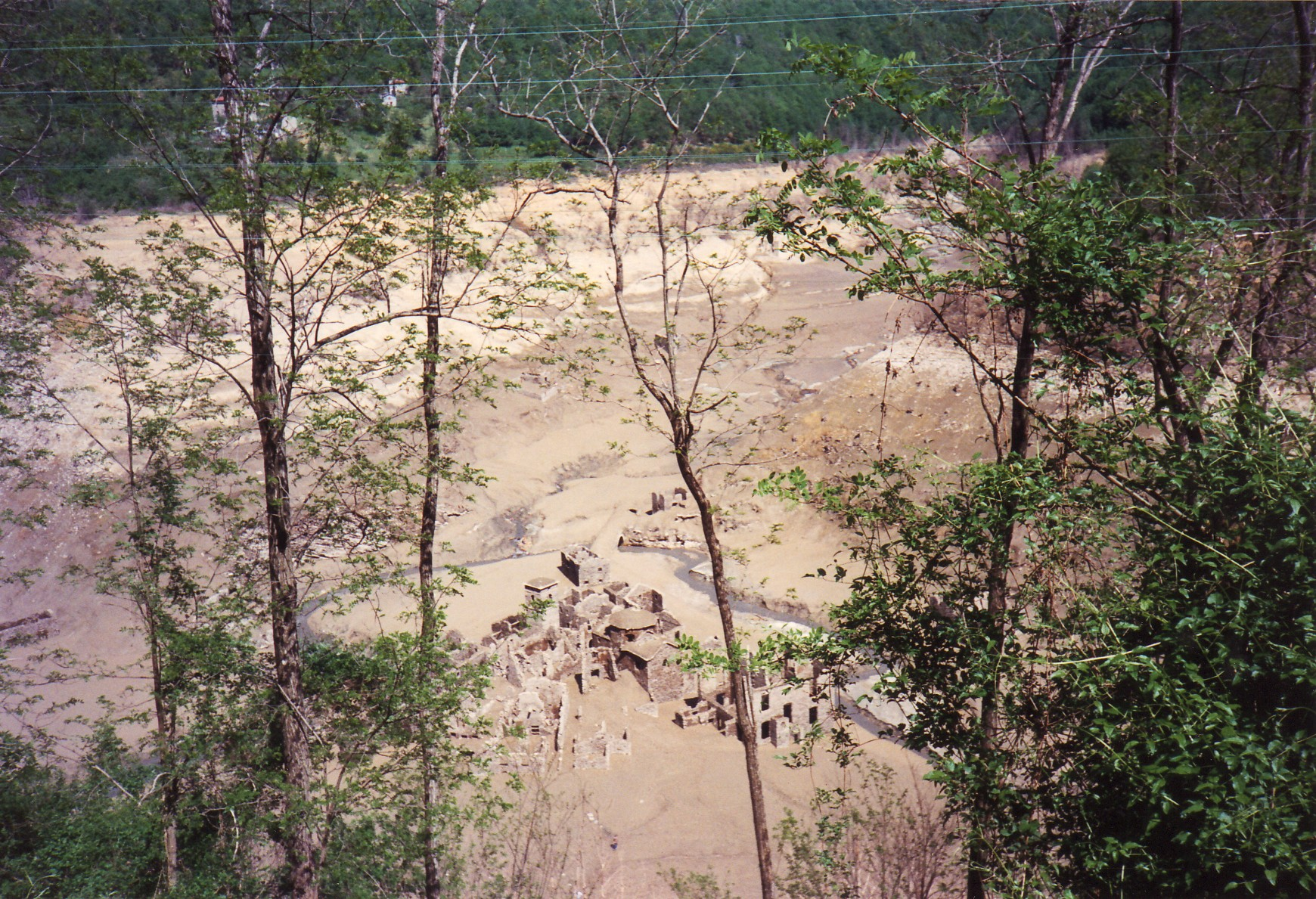 Il paese di Fabbriche di Careggine, sommerso dal lago di Vagli e visibile in occasione della periodica pulizia dell'invaso.